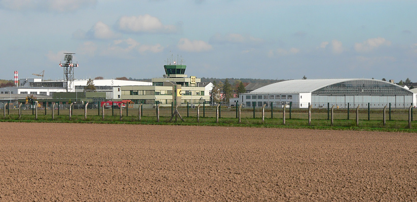 Flugplatz Fritzlar